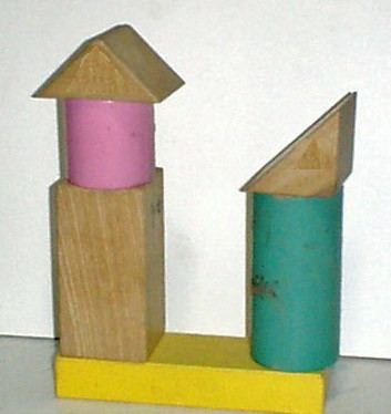 wooden blocks, wooden toys